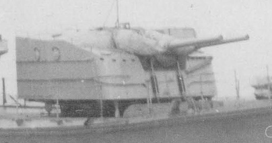 Torretta della Harusame II